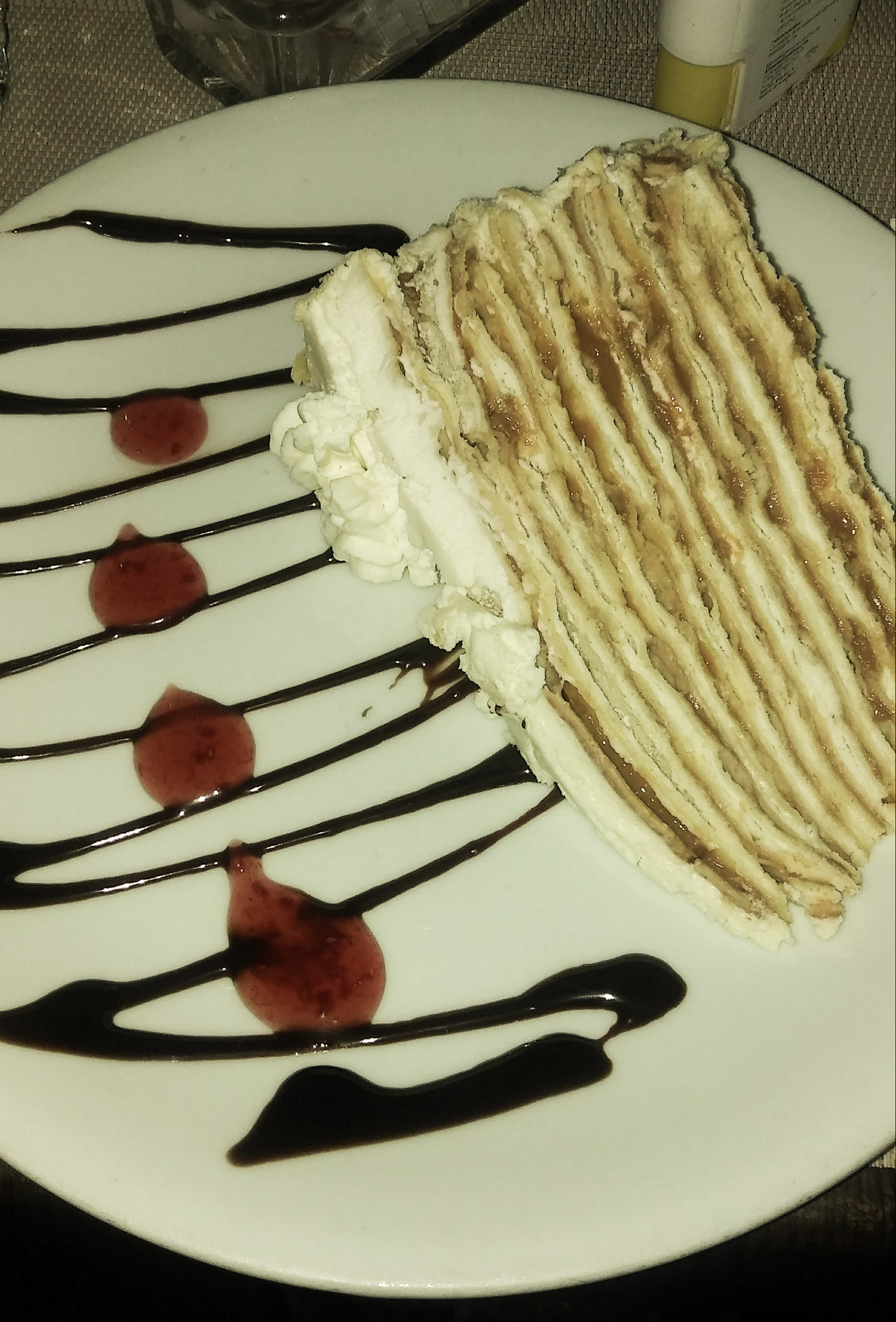 Torta Pompadour, pastel chileno de origen francés con gran popularidad en Rancagua.